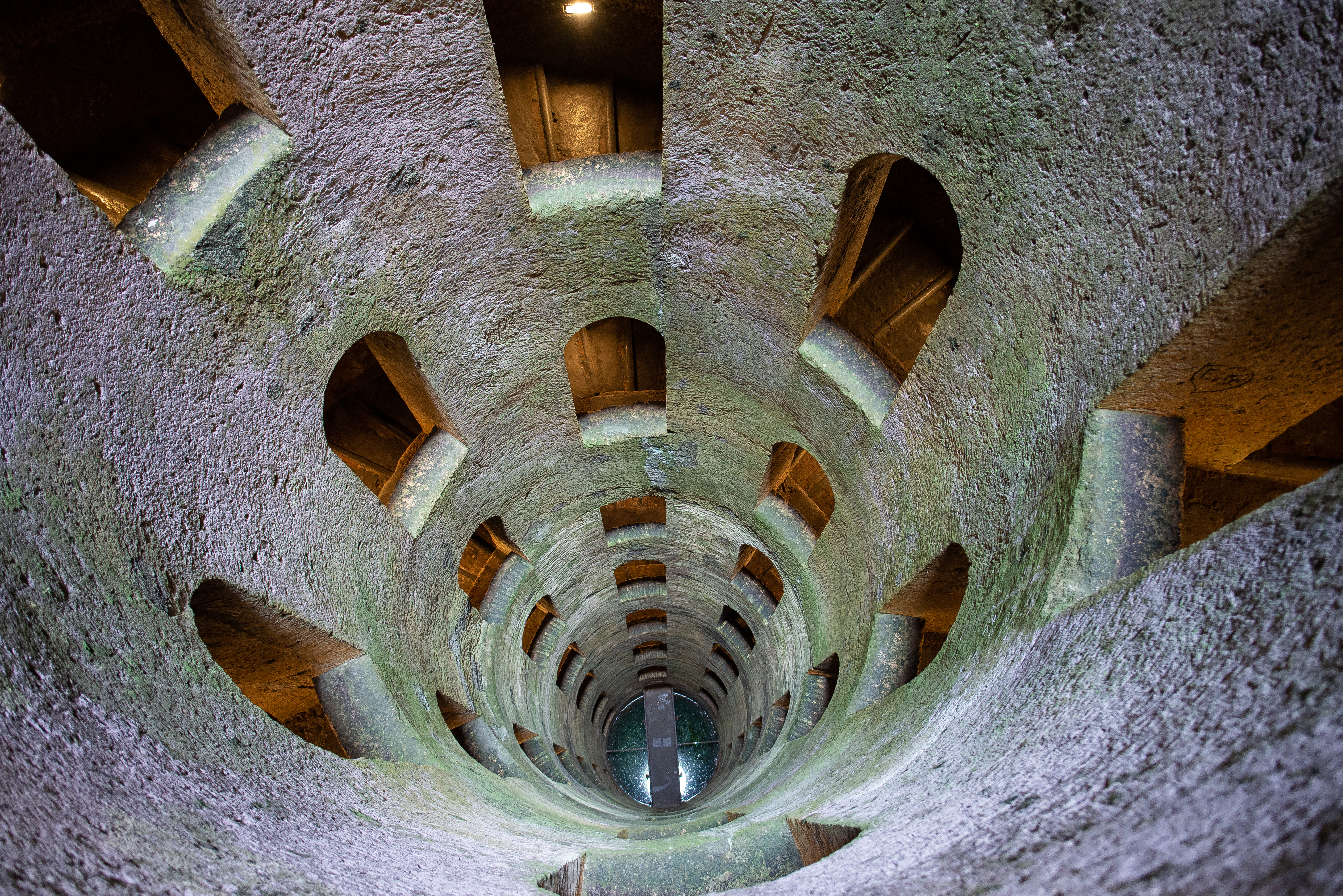 Vista dall'alto del Pozzo di S. Patrizio ad Orvieto. (TR)